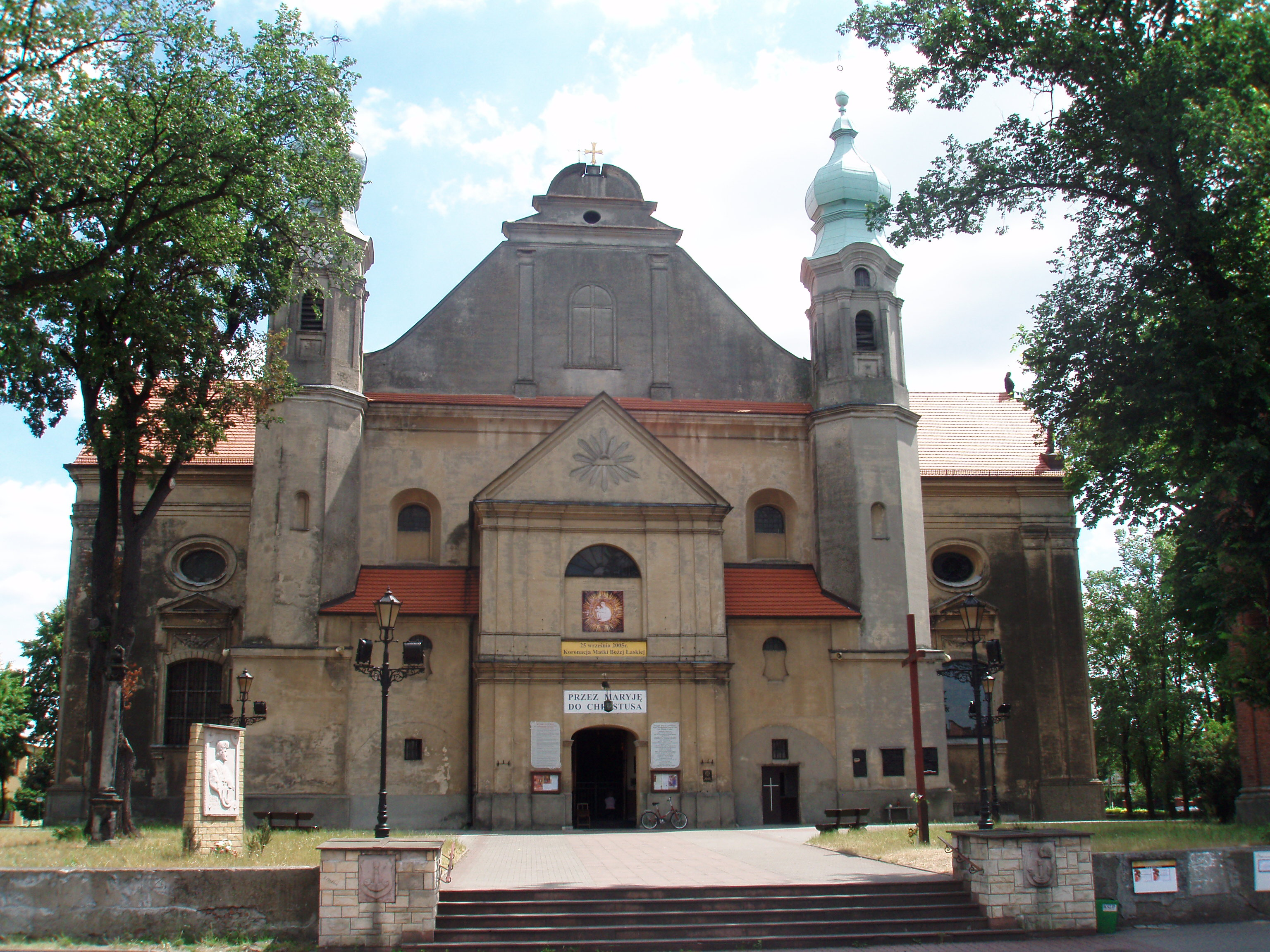 Kolegiata, kościół w Łasku. Widok od frontu. 2005